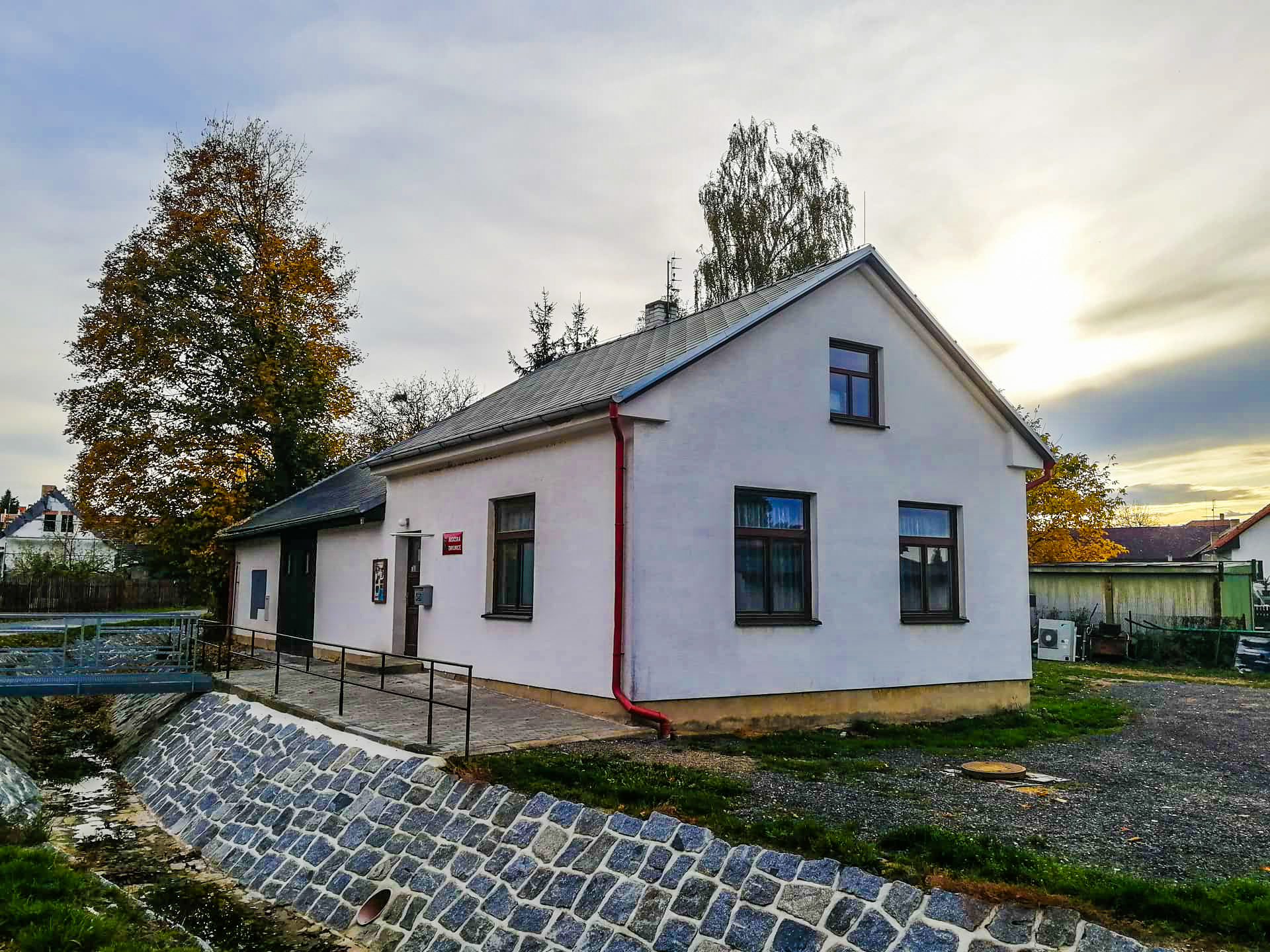 Sbor dobrovolných hasičů z Olešné u Hořovic sídlí na adrese Olešná 13, 267 64 Olešná.